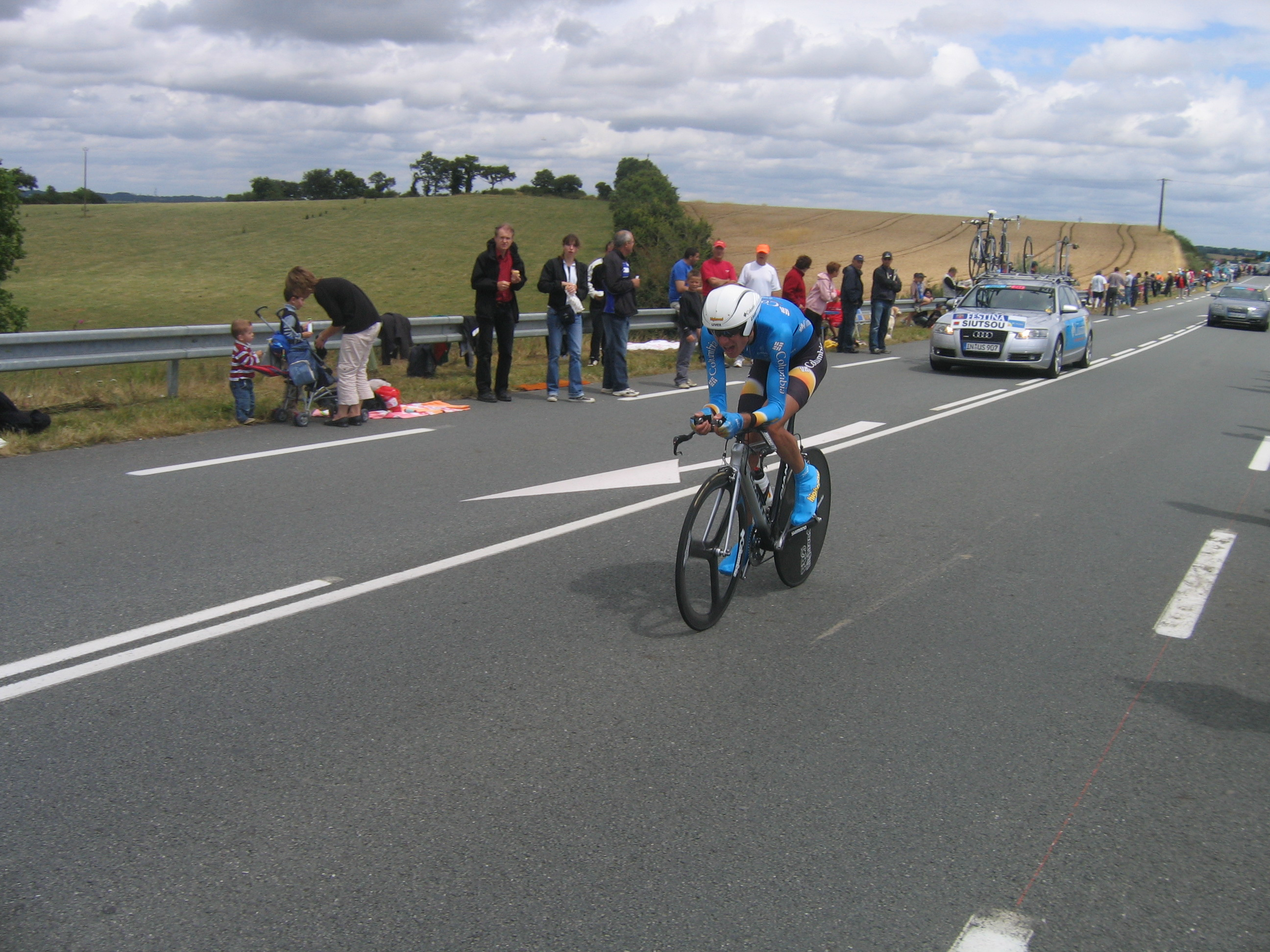 Kanstantsin Siutsou lors de la 4e étape du Tour de France 2008